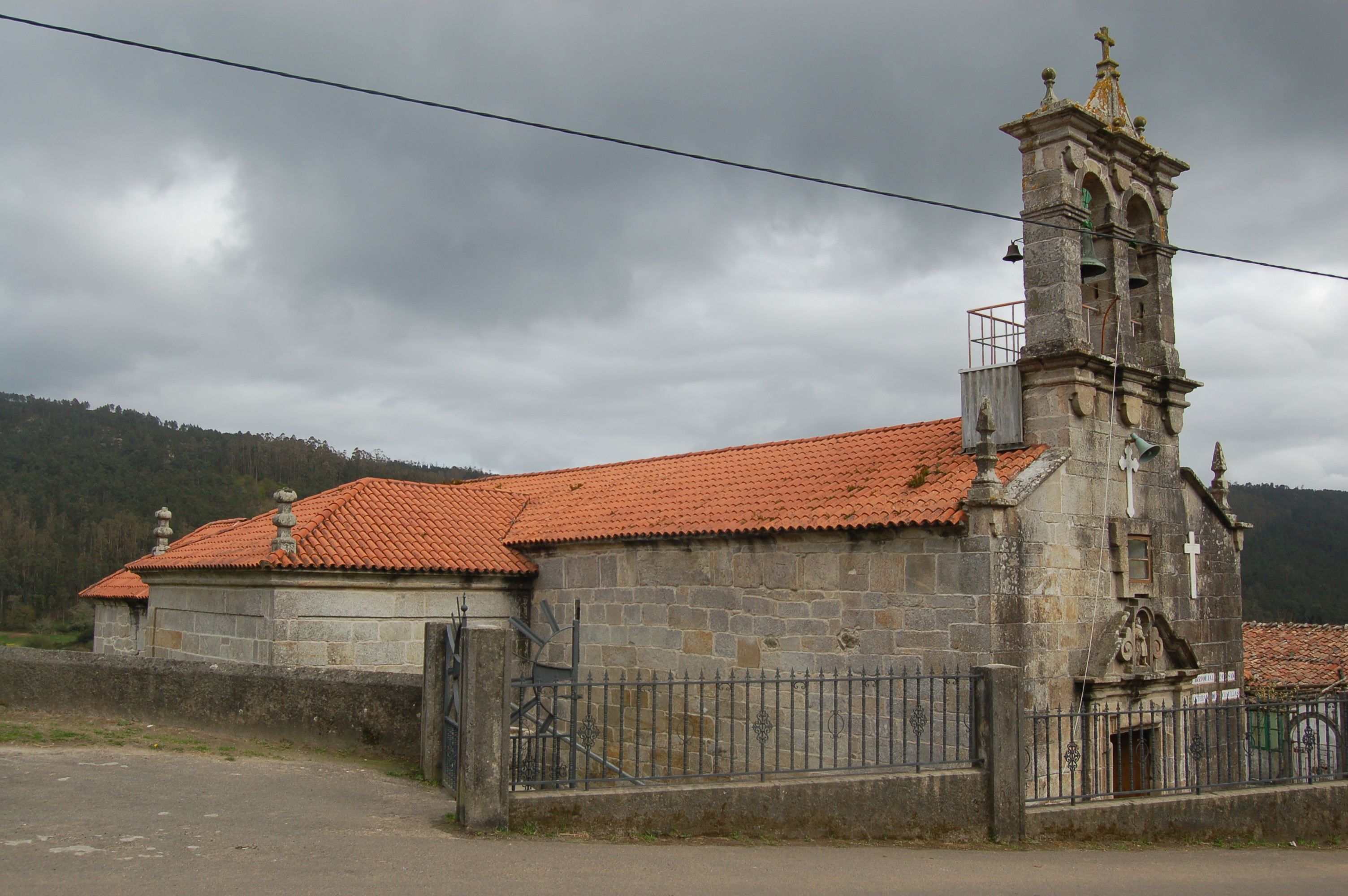 Igrexa parroquial de Cesullas (Cabana de Bergantiños).